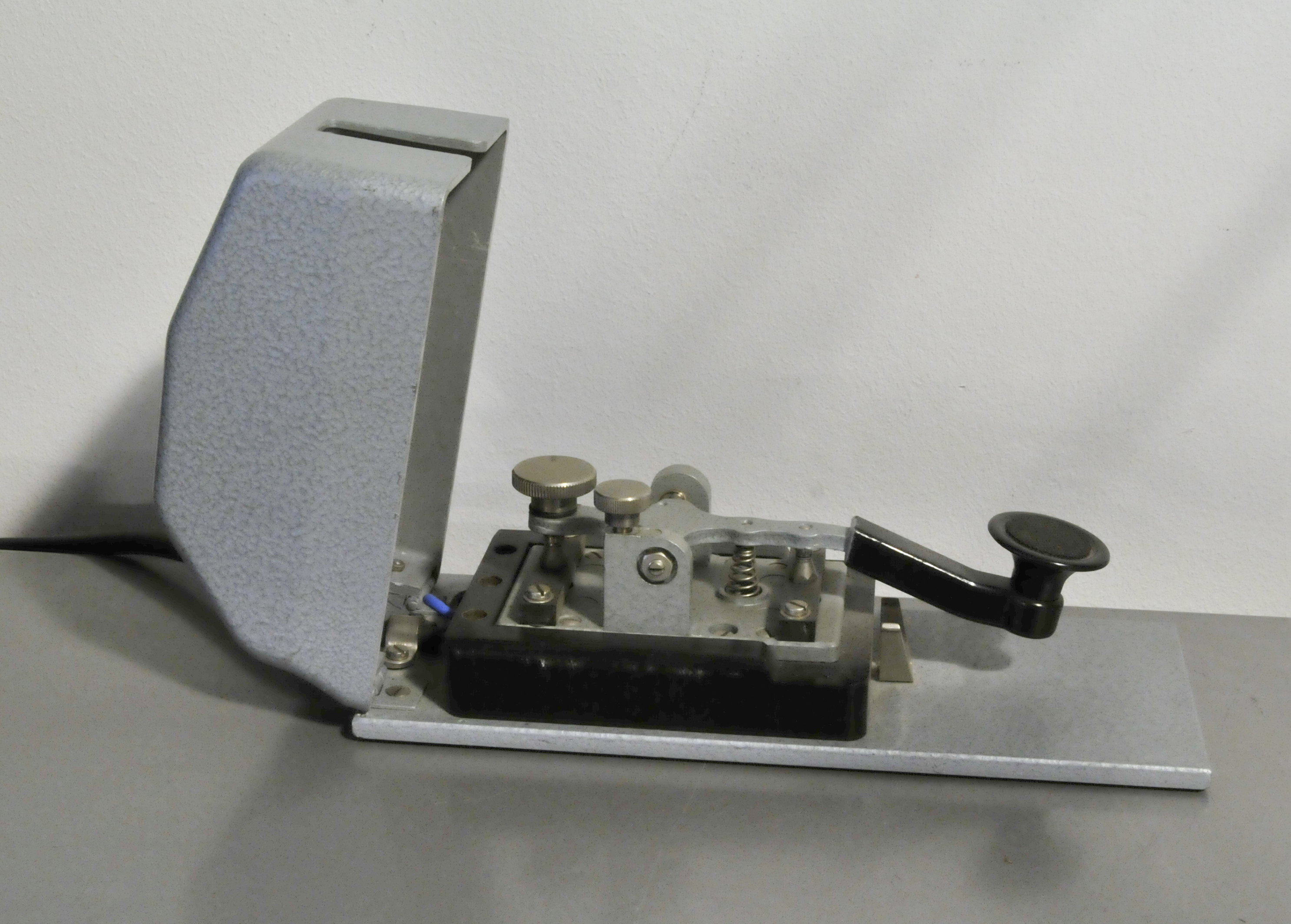 Junke Morsetaste MT, Zivile Version mit Hammerschlaglackierung Silber, seitenansicht, geöffnet